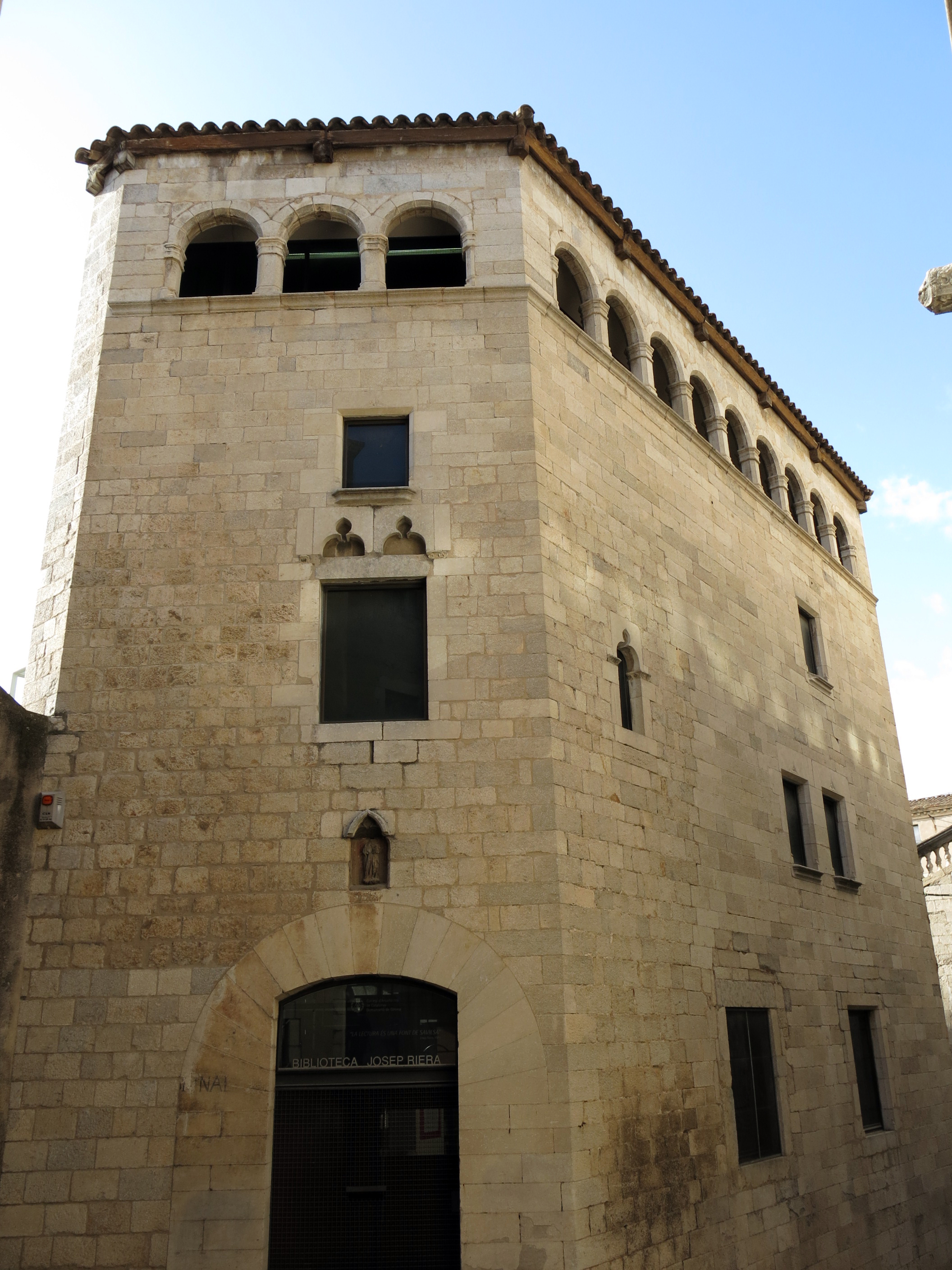 Pia Almoina (Girona)